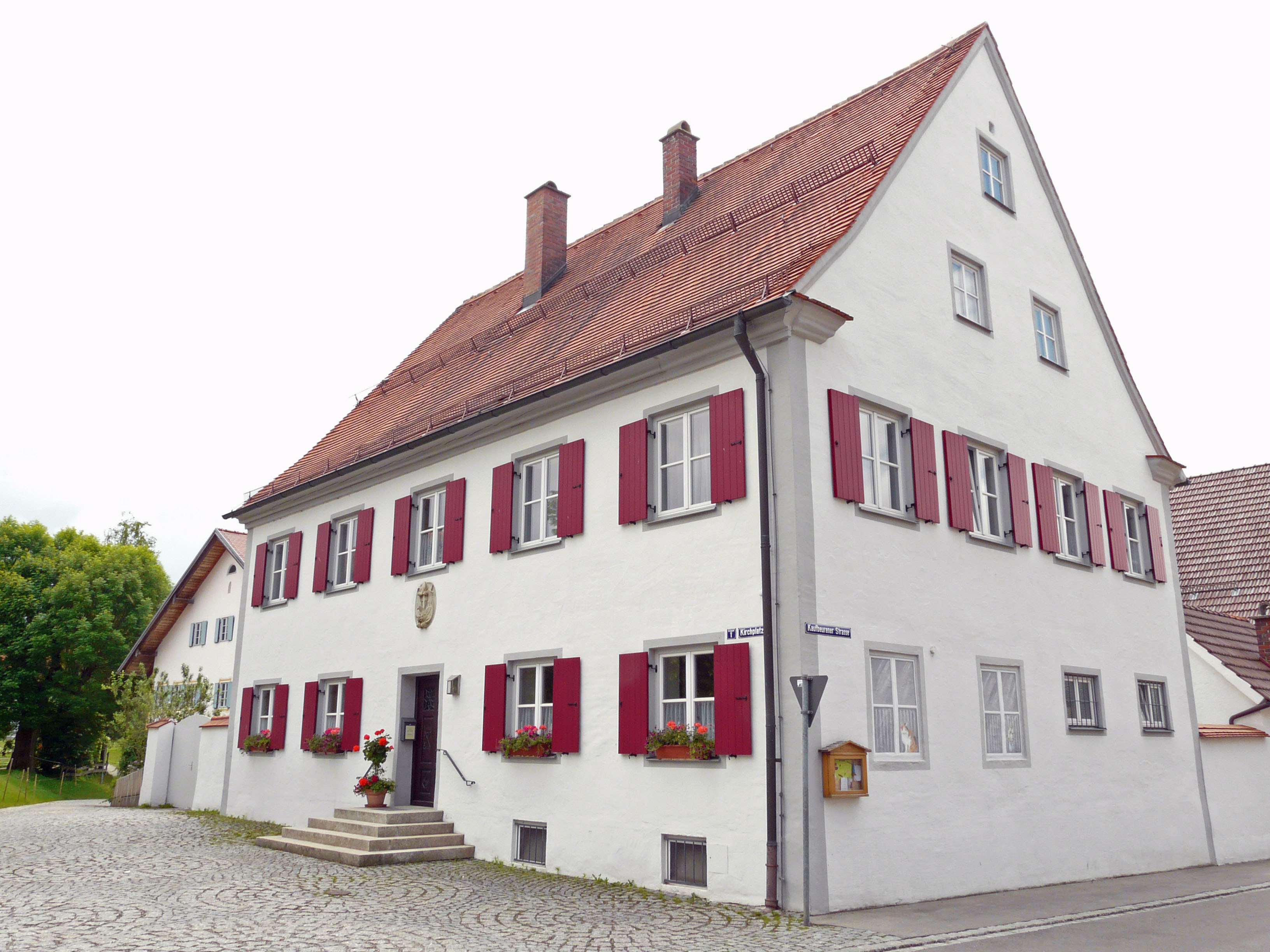 Pfarrhof in Mauerstetten